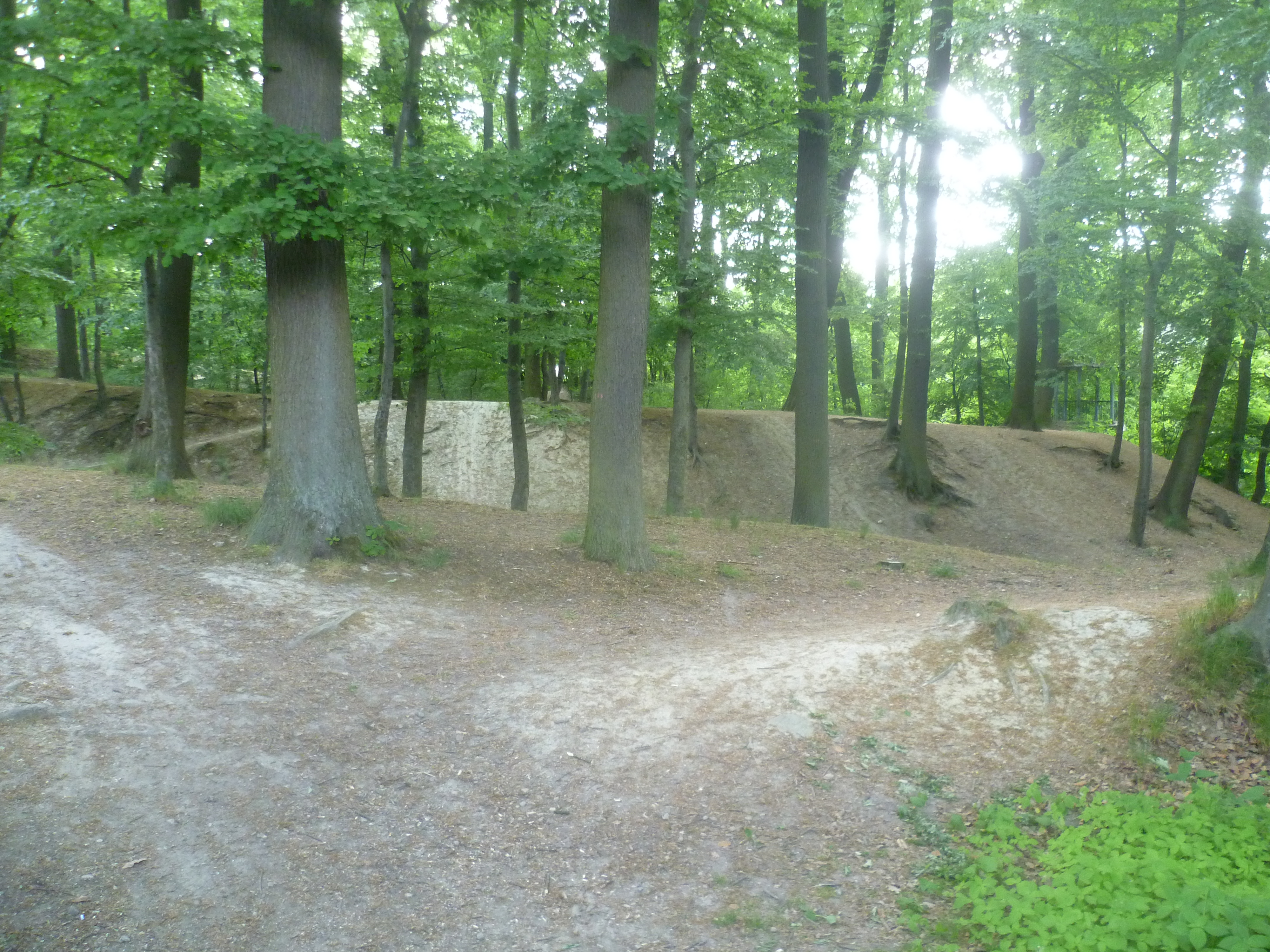 Die Schnepfenburg in Friedrichsdorf - eine Motte